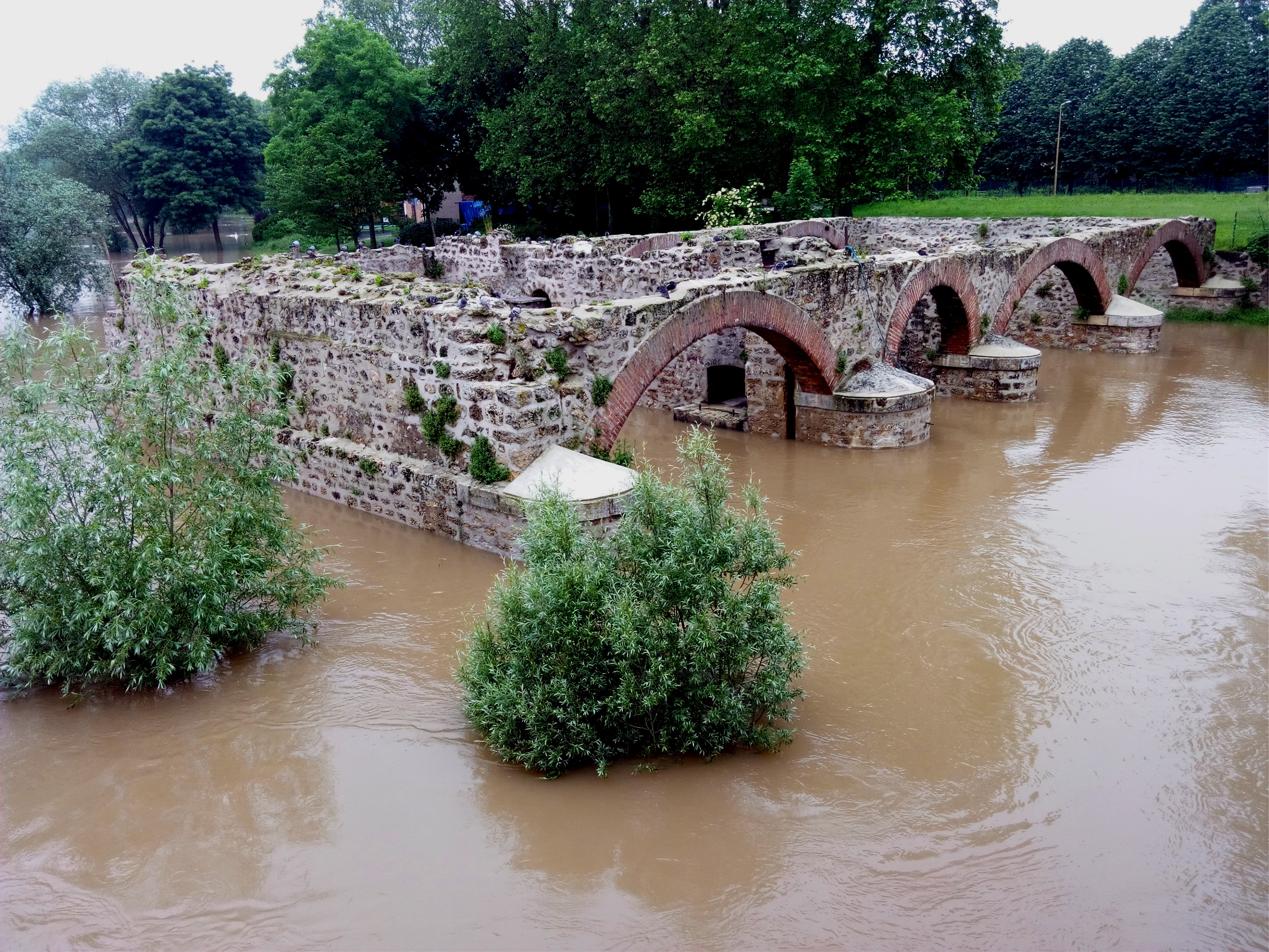 L'ancien Moulin sur la Marne pendant les inondations de juin 2016, Chelles, Seine-et-Marne, France.